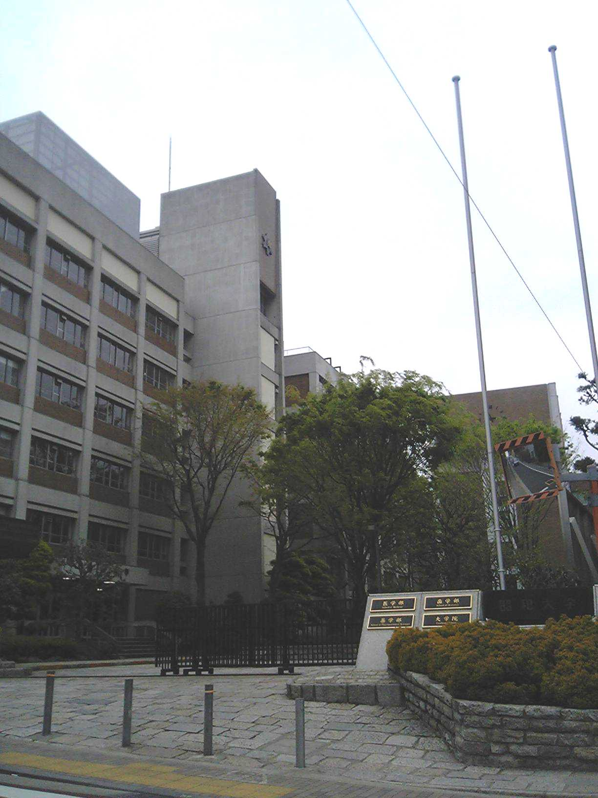 昭和大学（2006年4月23日投稿者が撮影） Category:大学の画像